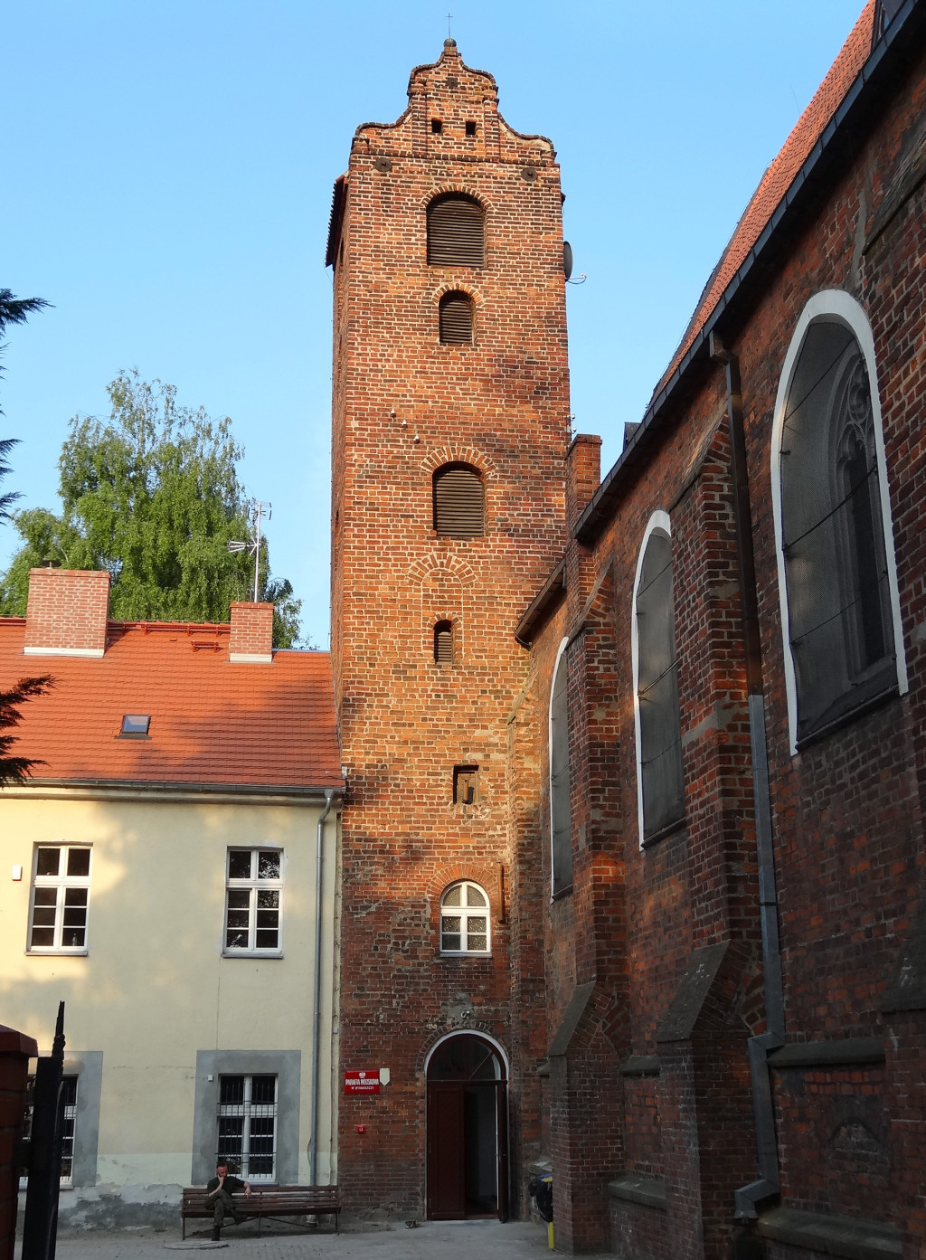 Kościół pobernardyński p.w. Najświętszej Maryi Panny Królowej Pokoju, zbud. 1552-1557, do 1830 kościół klasztorny bernardynów bydgoskich, od 1866 r. garnizonowy